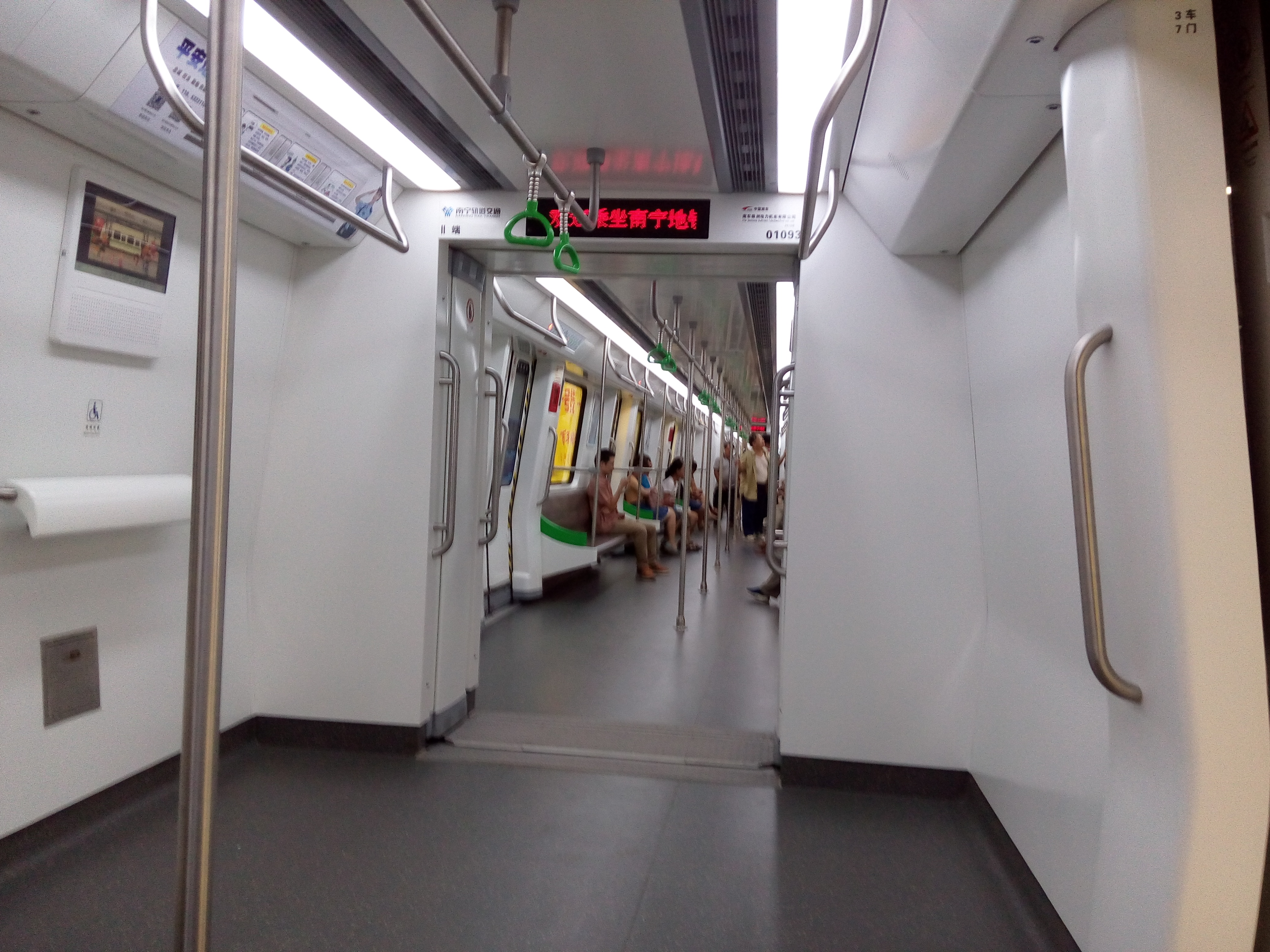 中文（中国大陆）: 南宁轨道交通